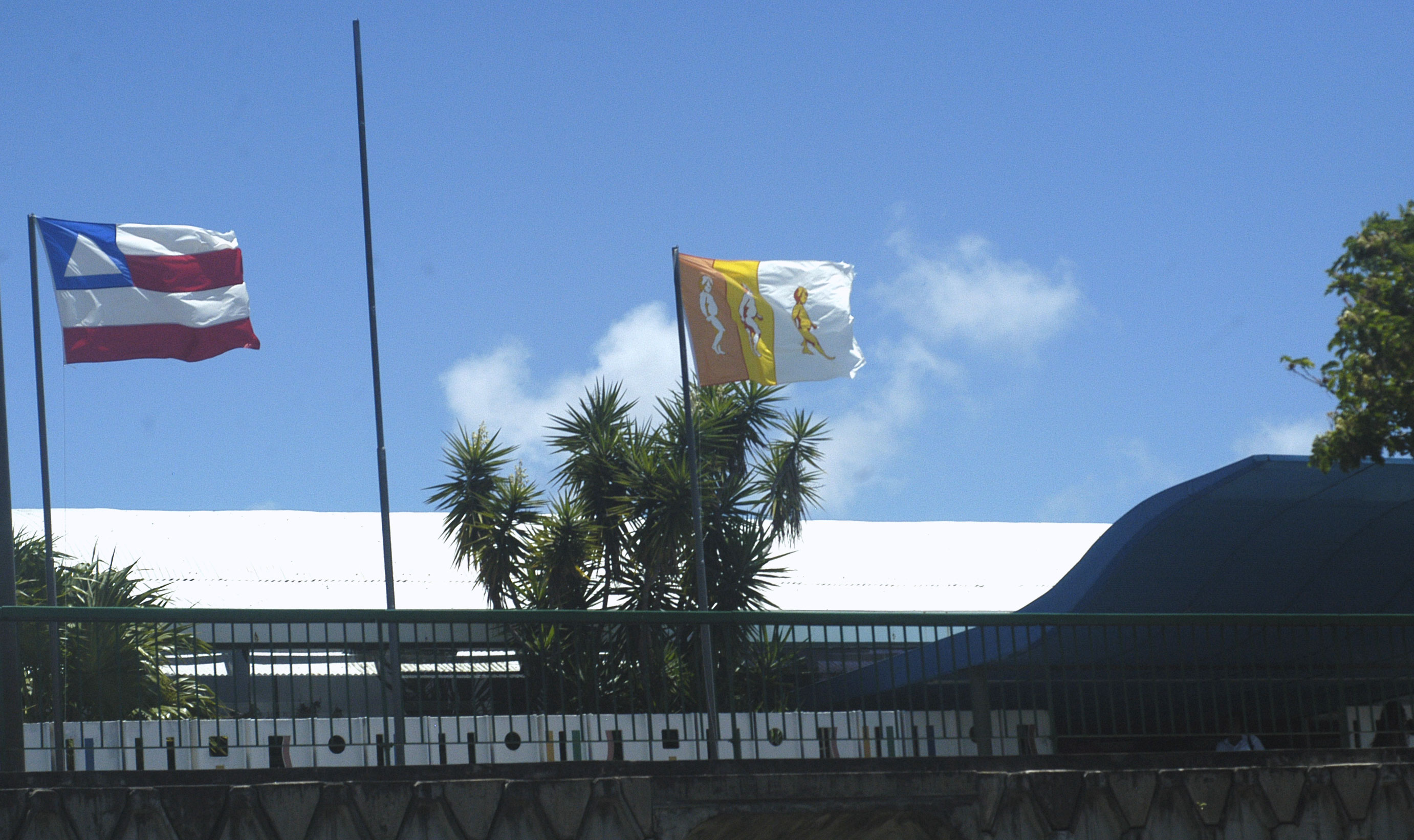 Rede Sarah Unidade de Salvador Bahia, bandeiras próiximas à entrada do ambulatório de consultas